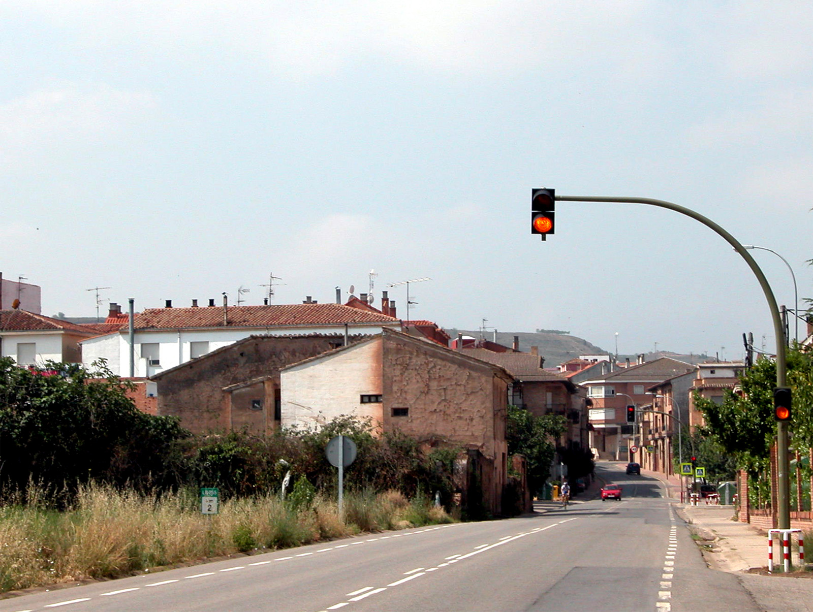 Entrada del pueblo de Alberite.